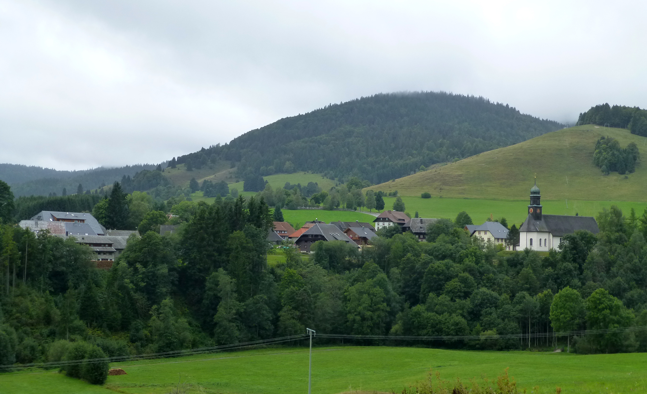 Hameau de Riggenbach, commune de Bernau, Forêt-Noire, District de Waldshut.